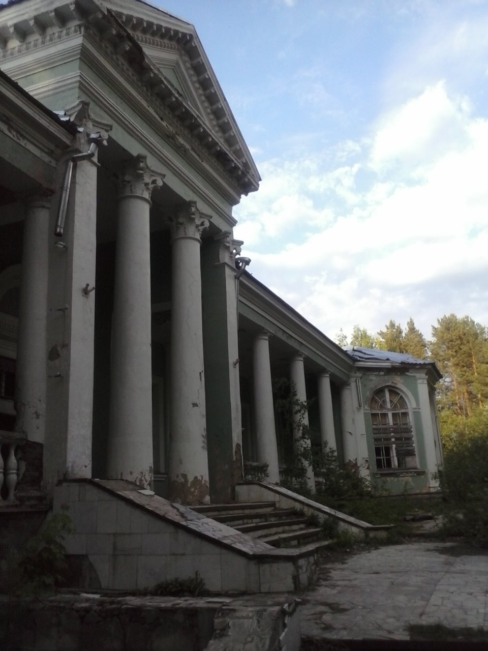 Заброшенная столовая дома отдыха "Чепца", Глазовский район Удмуртии